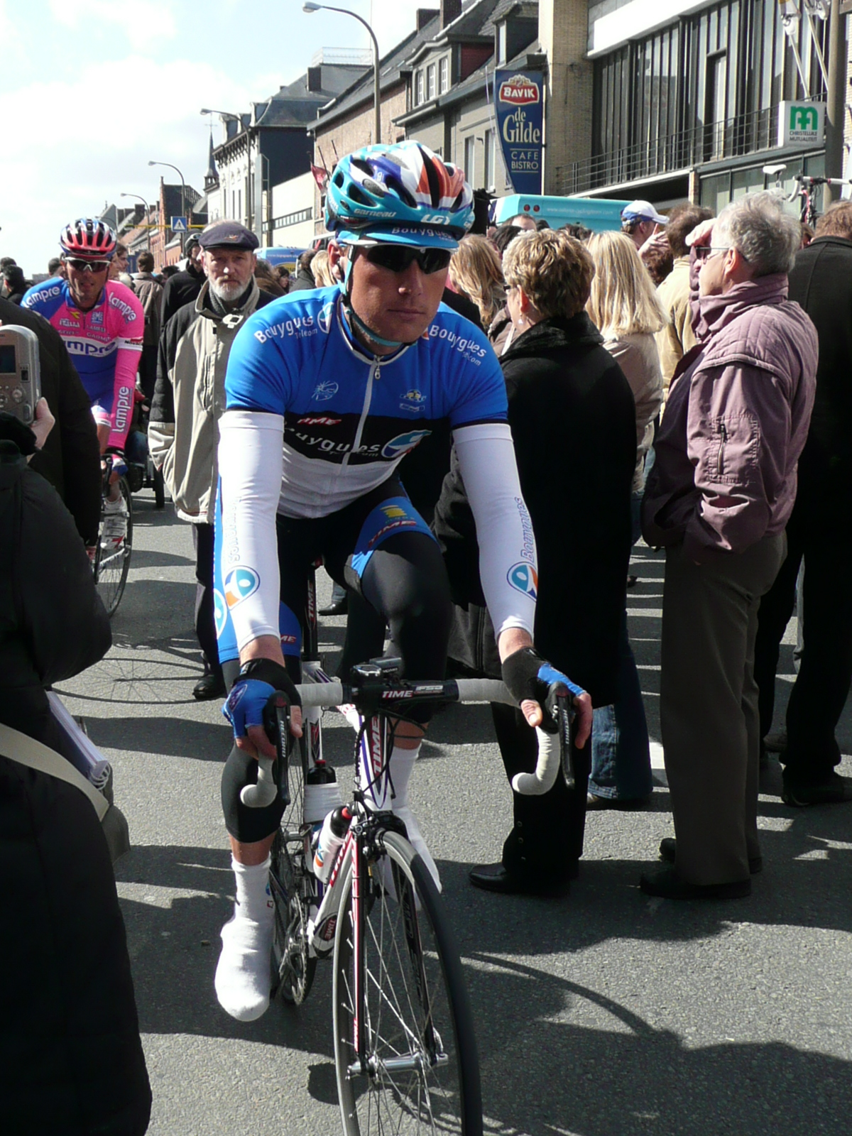 Erki Pütsep before the start of the E3 Prijs Vlaanderen 2008